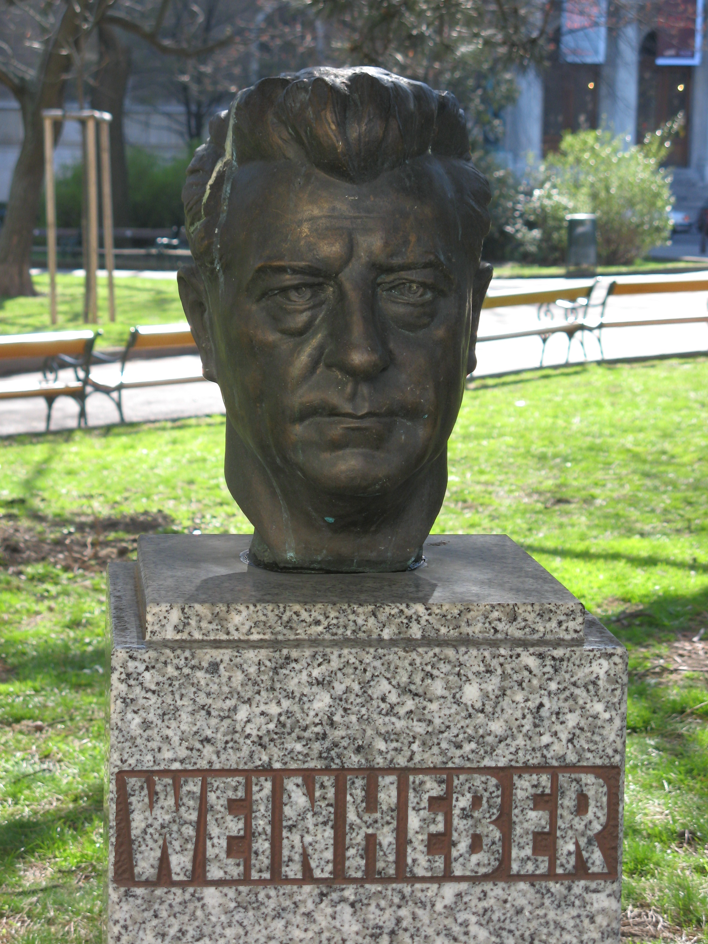 Bronzebüste Josef Weinheber (1940) von Josef Bock im Schillerpark in Wien